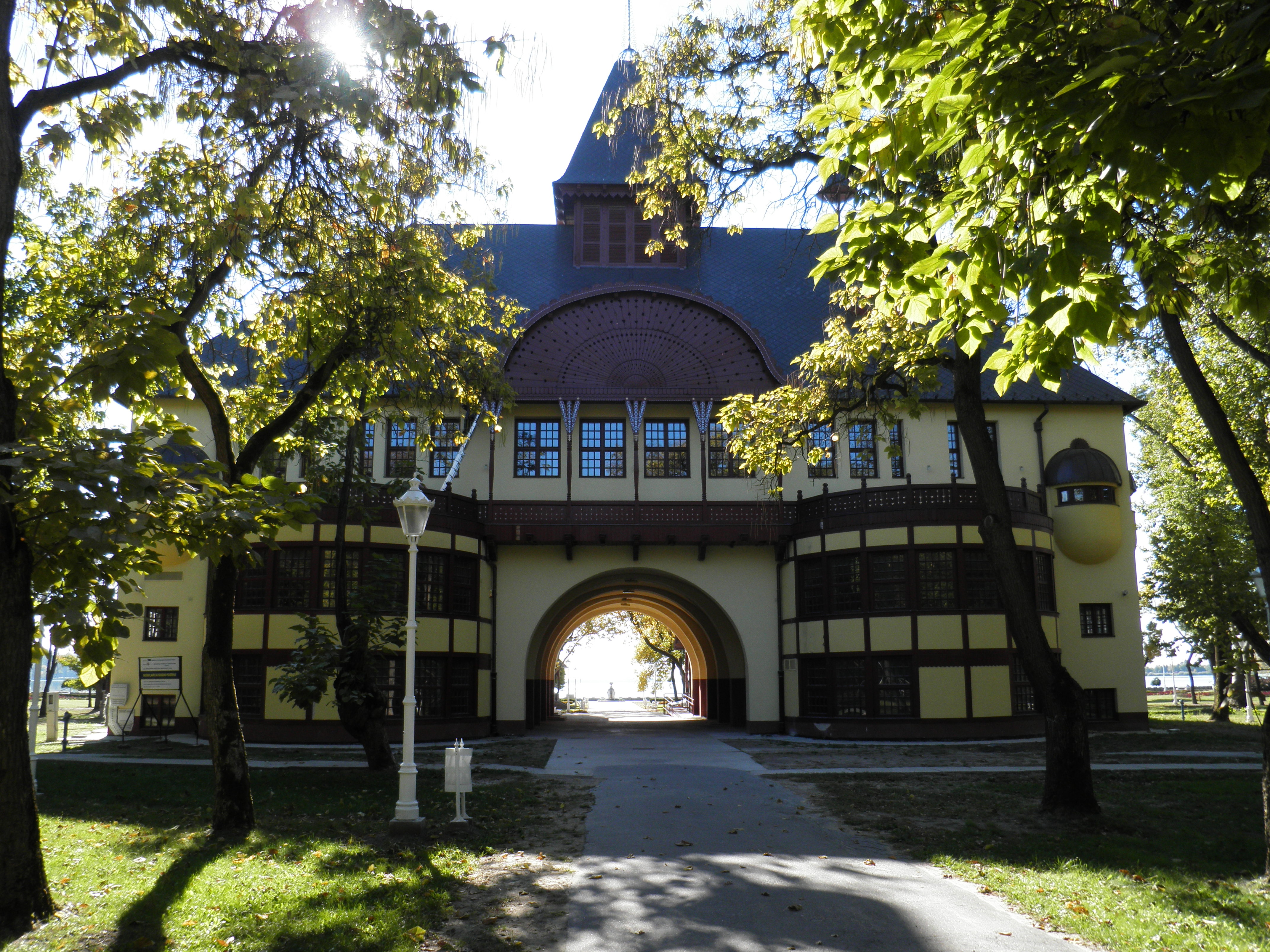 Palićko jezero